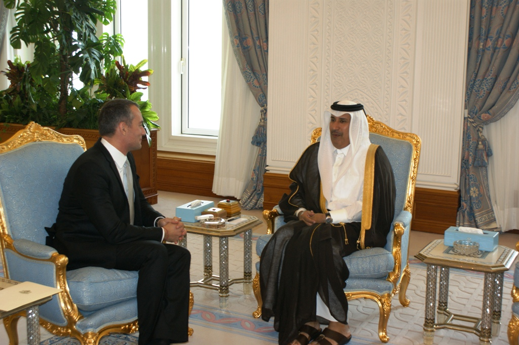 Министър председател и Министър на външните работи Н.Пр. Хамад бин Джасем